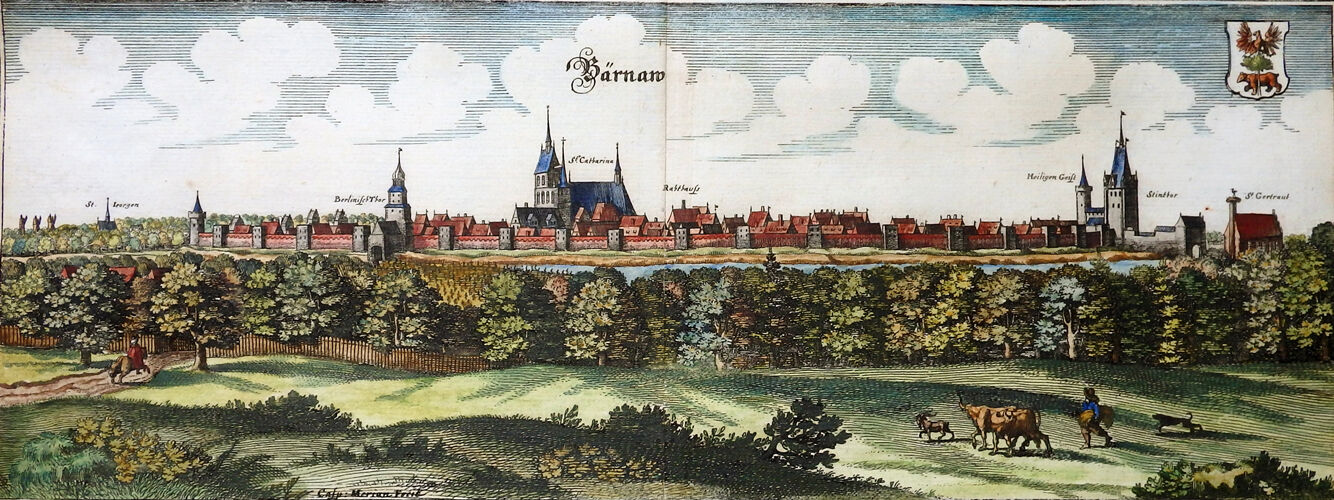 Mark Brandenburg, Bernau, Merian-Topographia, Kolorierter Kupferstich